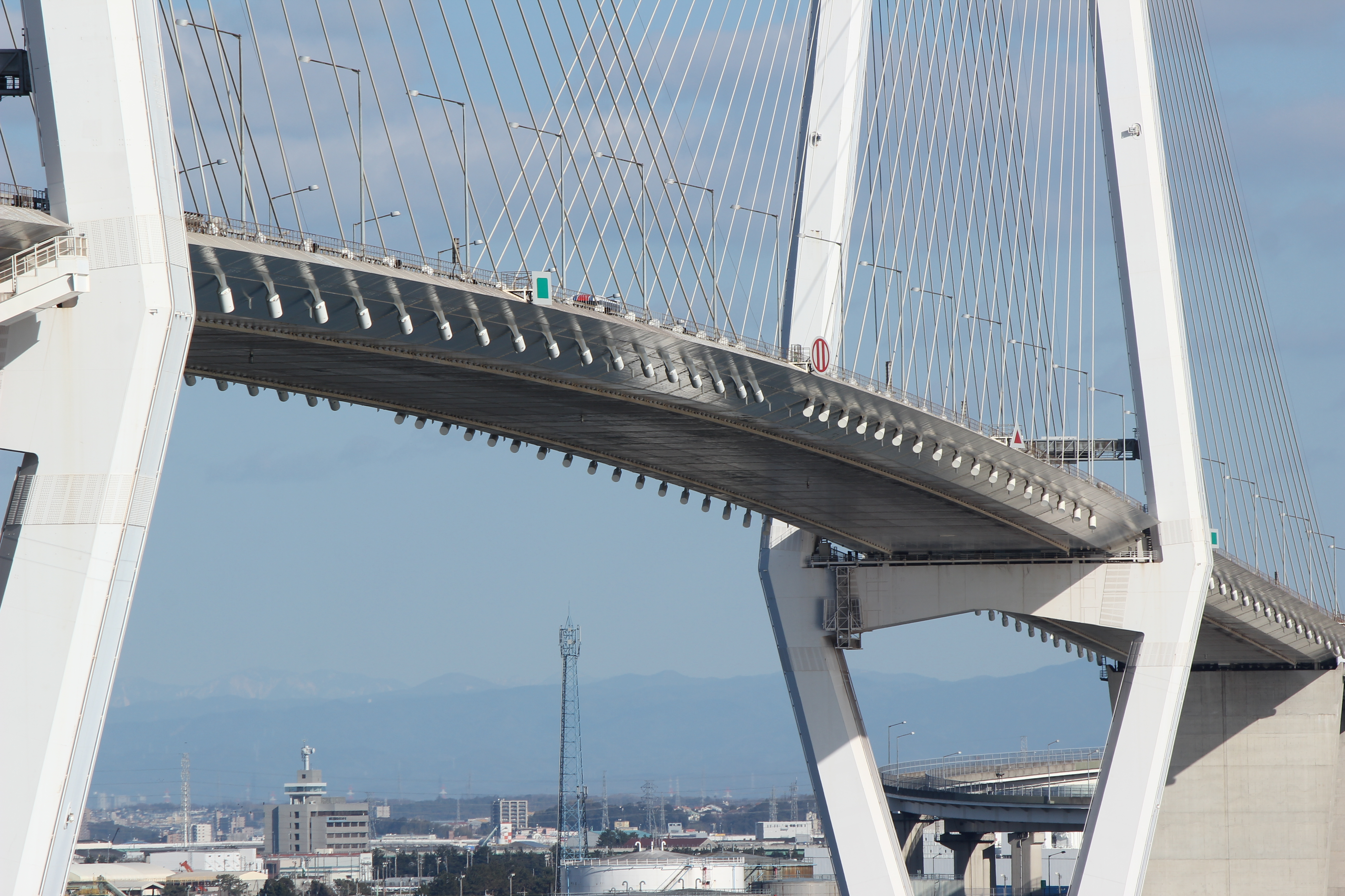 名港中央大橋の橋梁標群